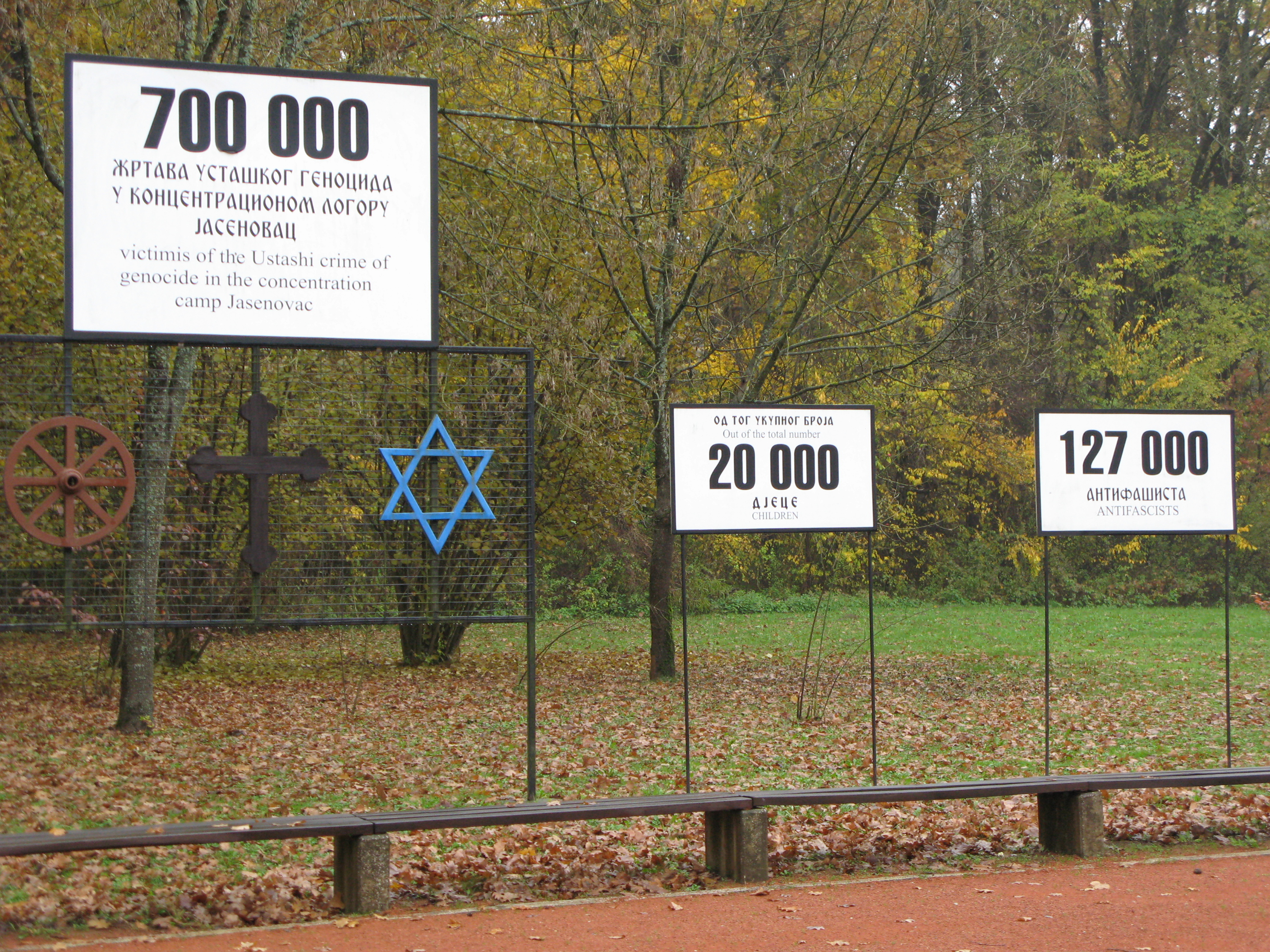 Table koje prikazuju broj žrtava logora Jasenovac.